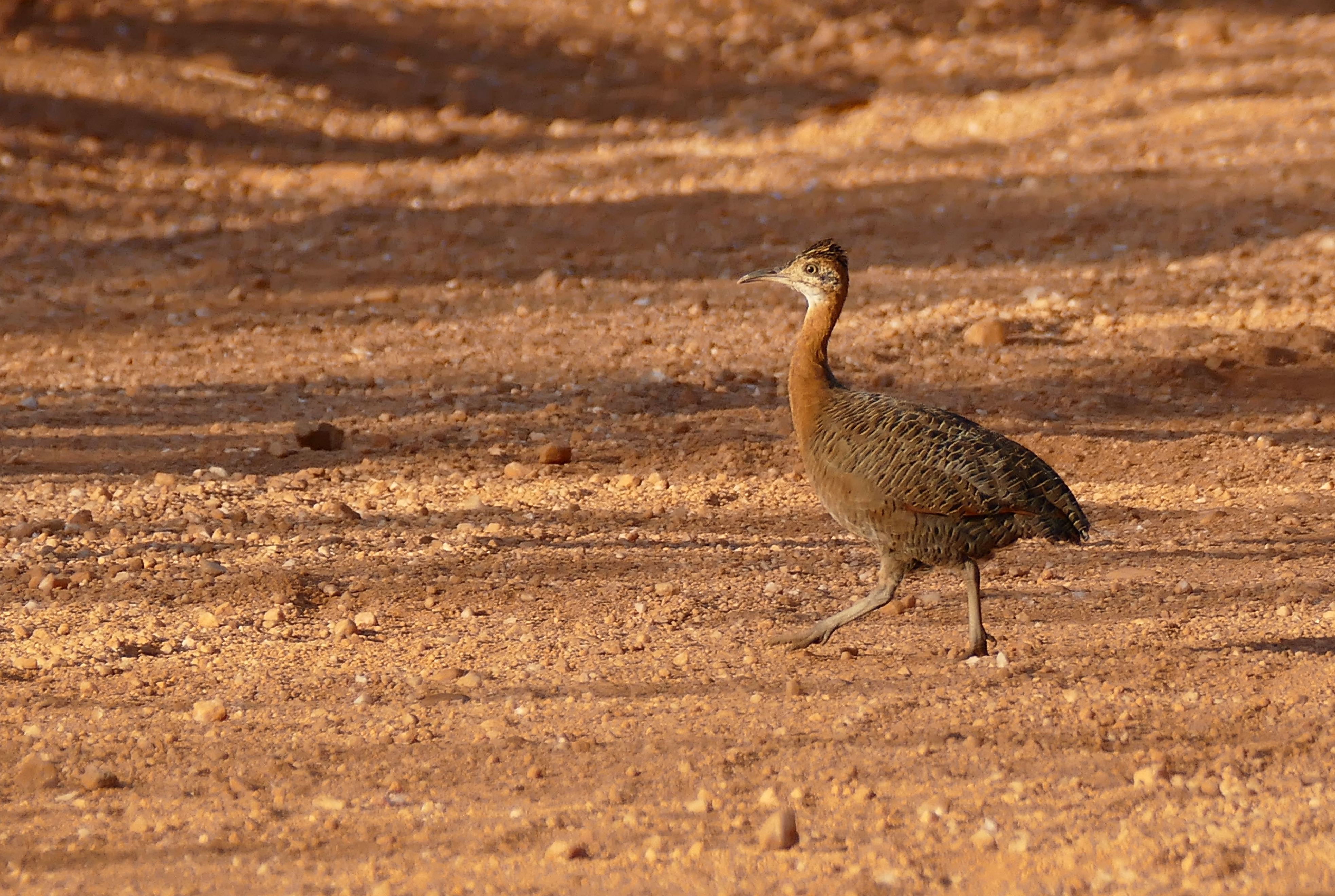 Transpantaneira, Poconé, Mato Grosso, BRAZIL